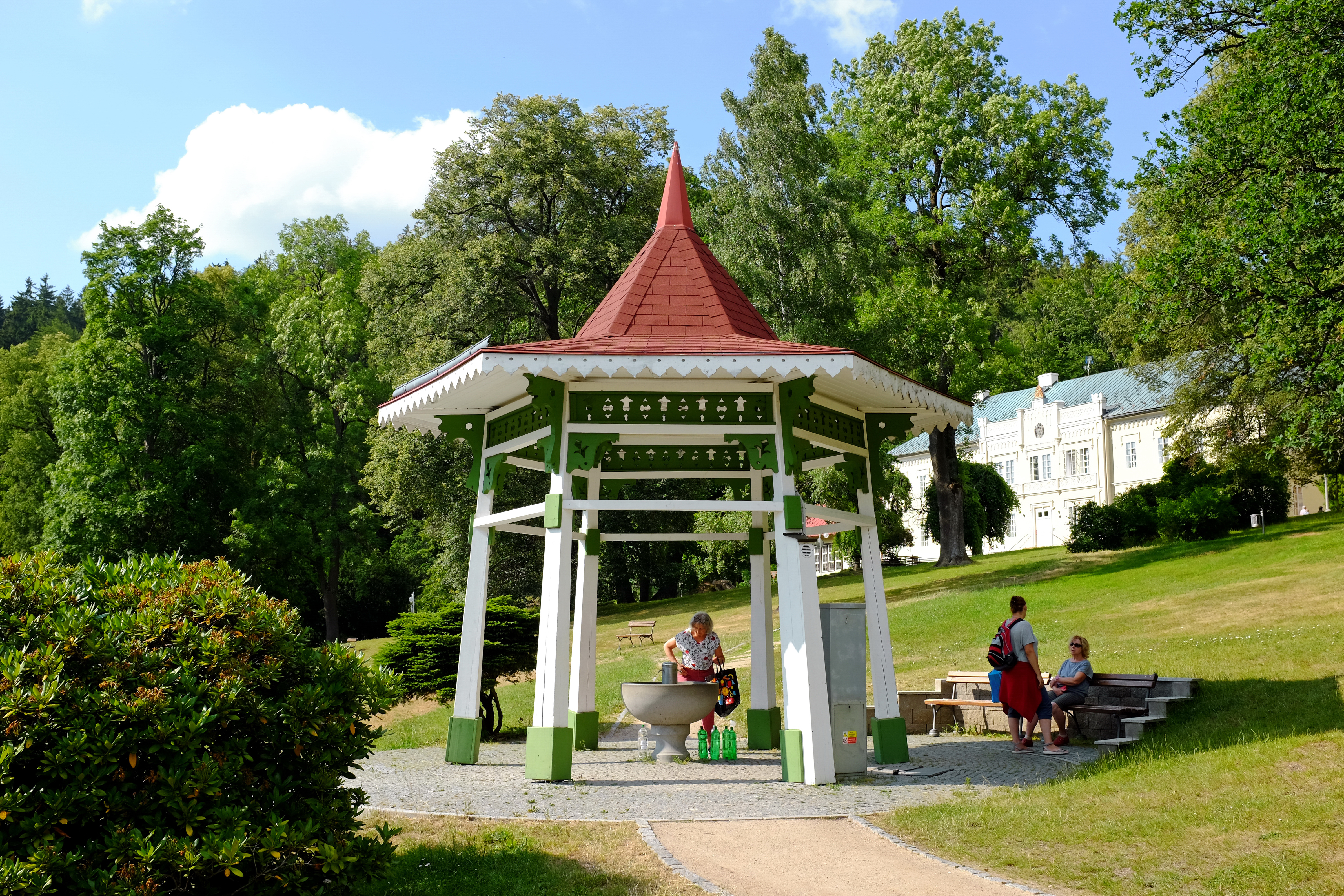 Lázně Kynžvart, minerální pramen Richard